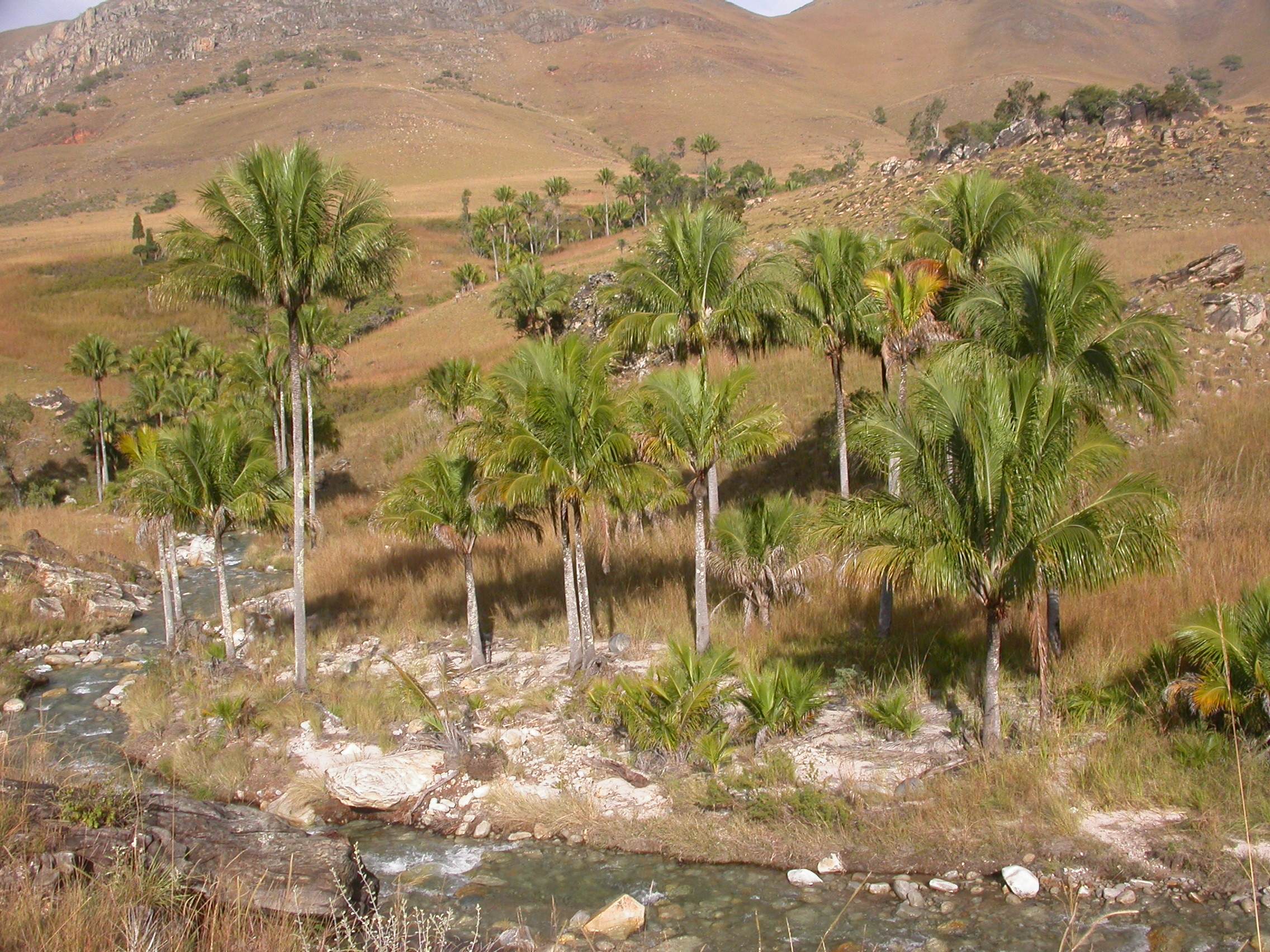 Beccariophoenix alfredii in habitat, Madagascar